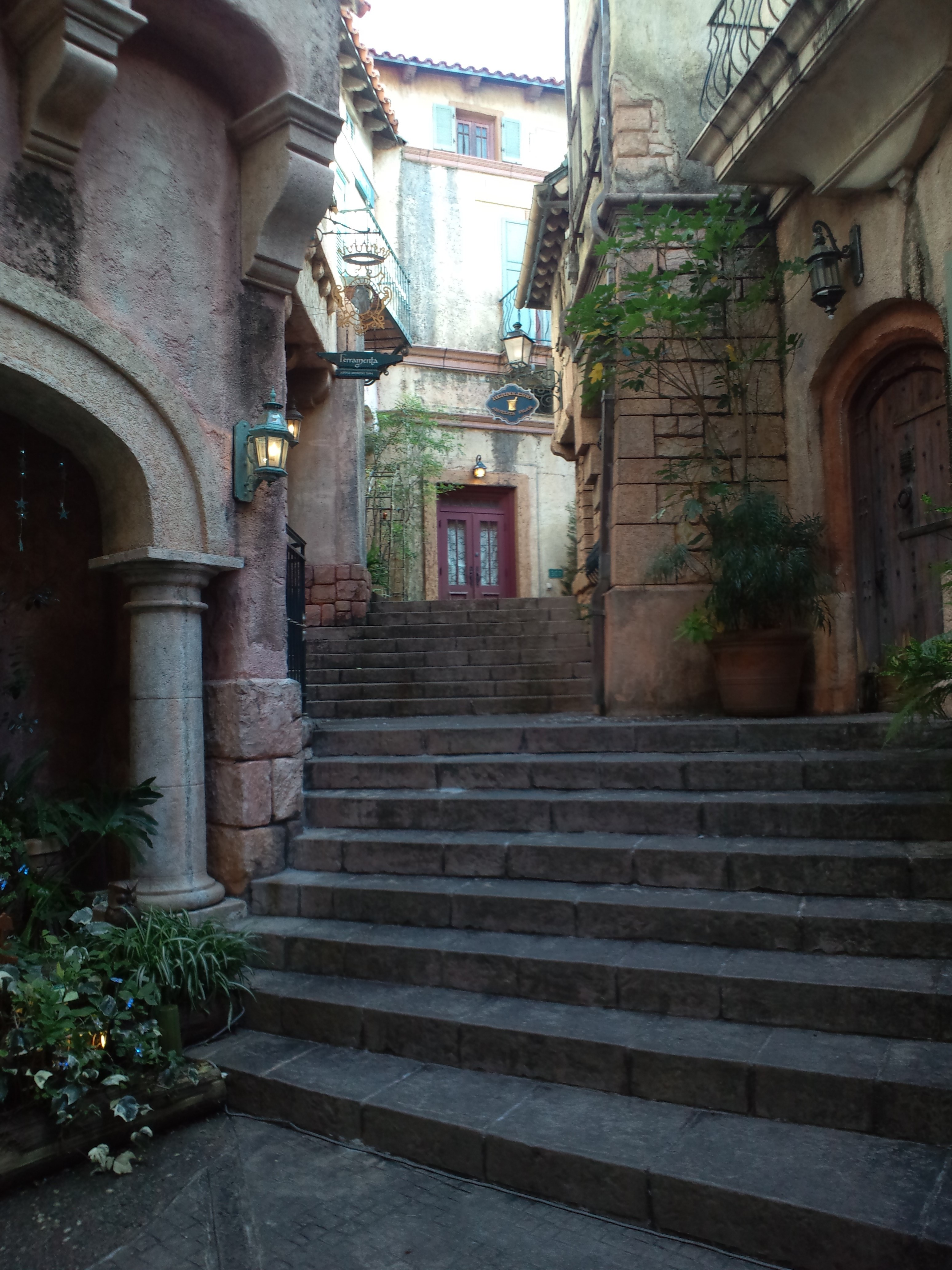 ポルトヨーロッパ イタリアの街並み